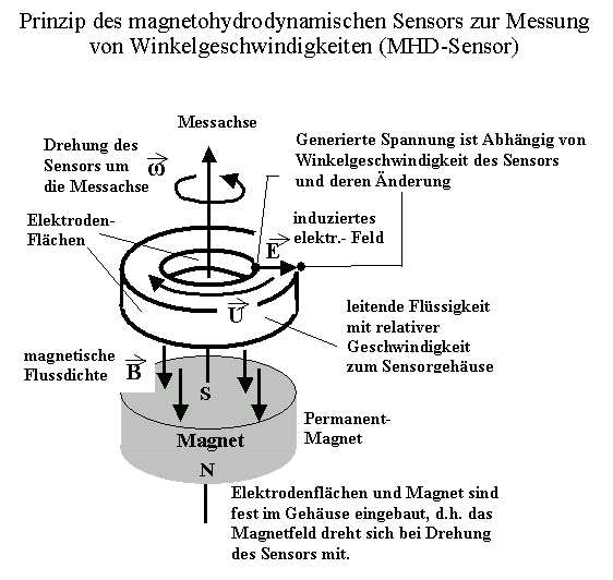 Prinzip eines MHD-Sensors zur Messung von Winkelgeschwindigkeiten.